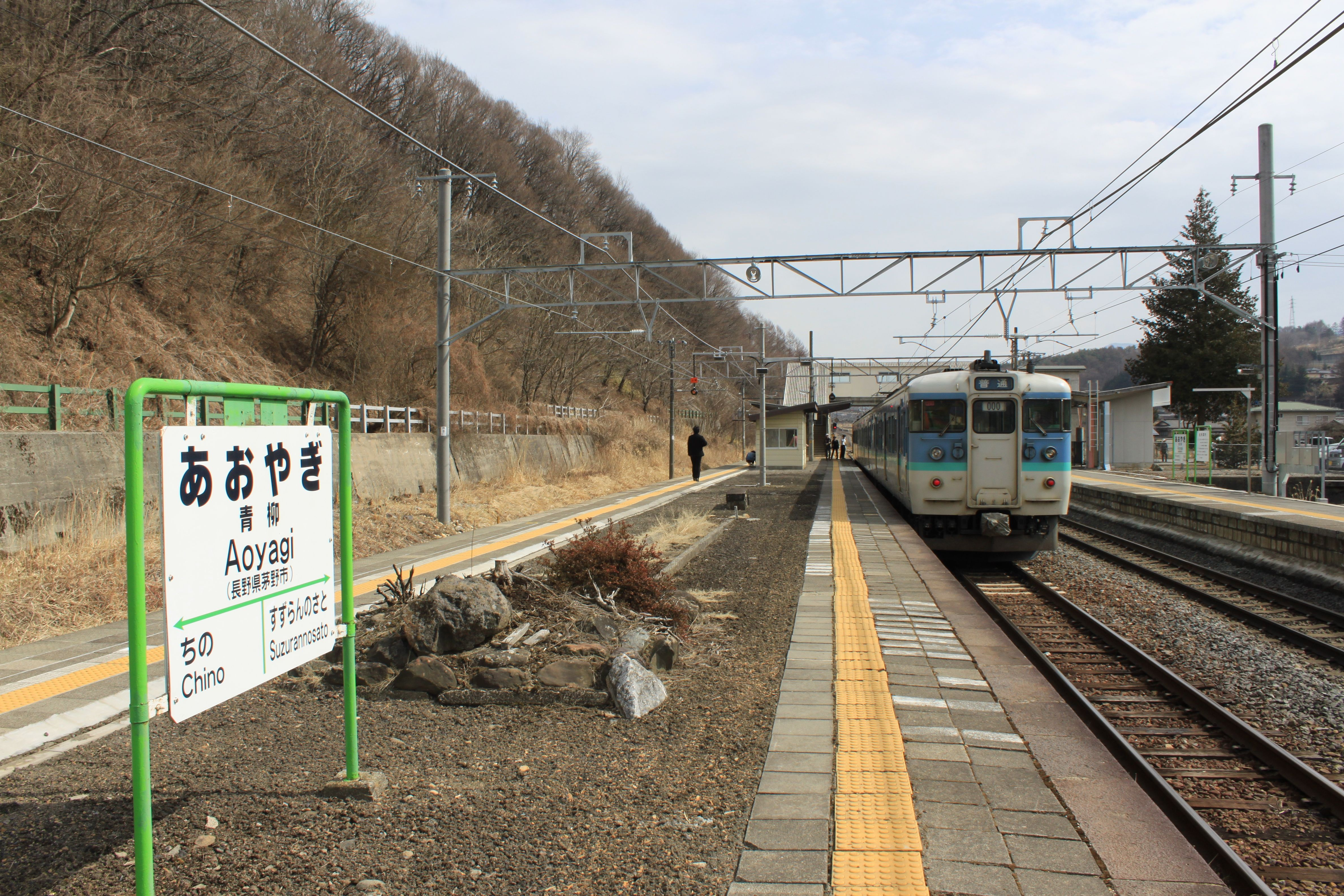 青柳駅